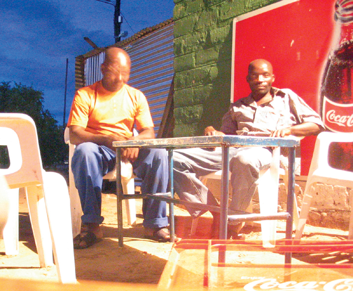 Cuca Shop in Okankolo (Region Oshikoto)